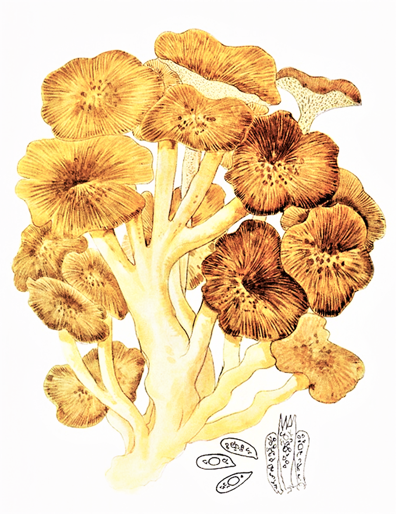 Giacomo Bresadola: Polyporus umbellatus (Christian Hendrik Persoon, 1801 ex Elias Magnus Fries, 1821)